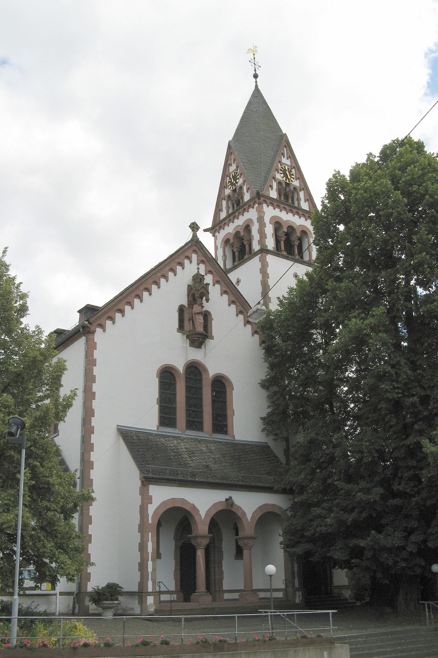 Katholisch Pfarrkirche Sankt Matthias in Langendernbach (erbaut 1895/97(, recht im Bild die „800 jährige Doppellinde“